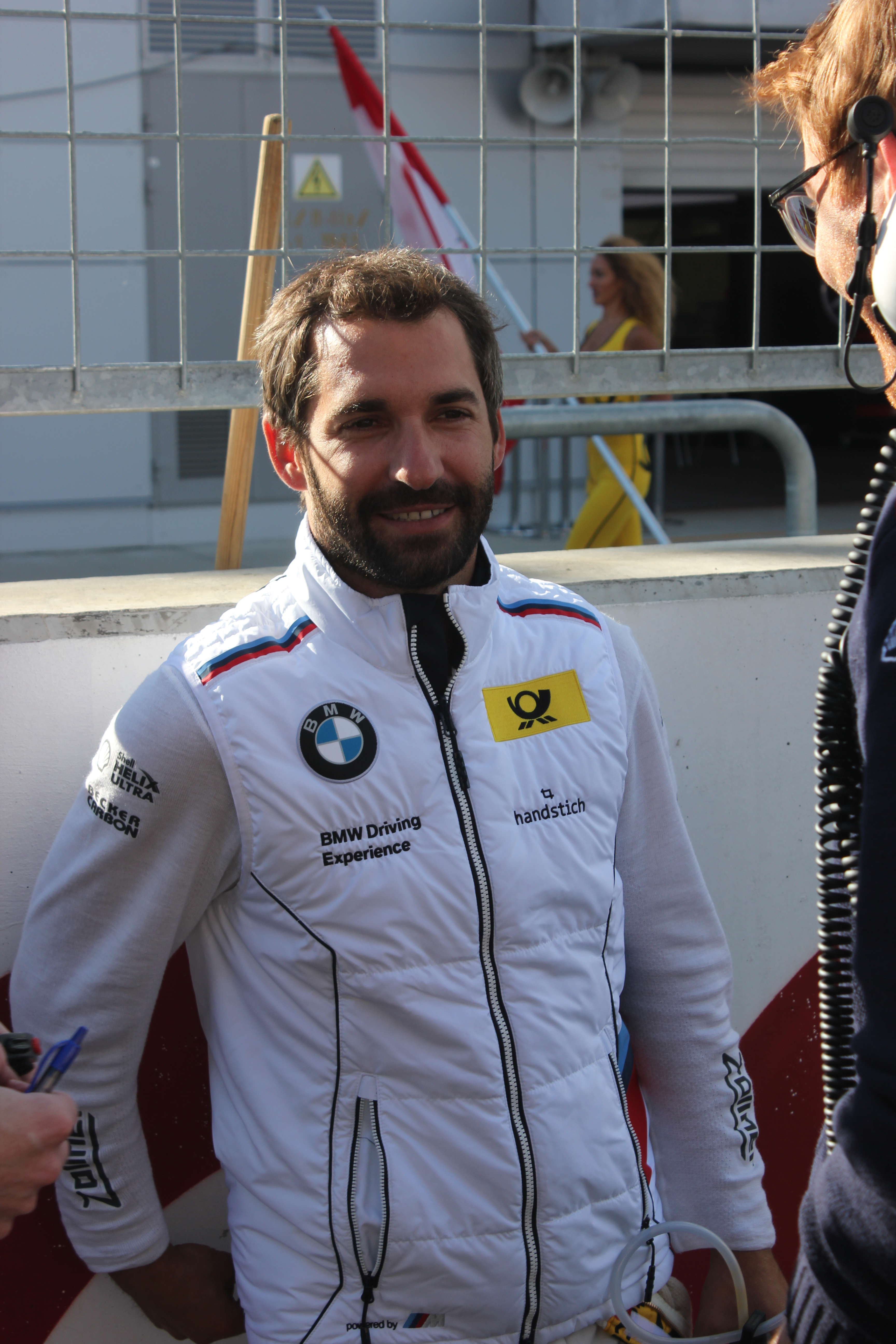 Timo Glock Moscowraceway DTM 2015